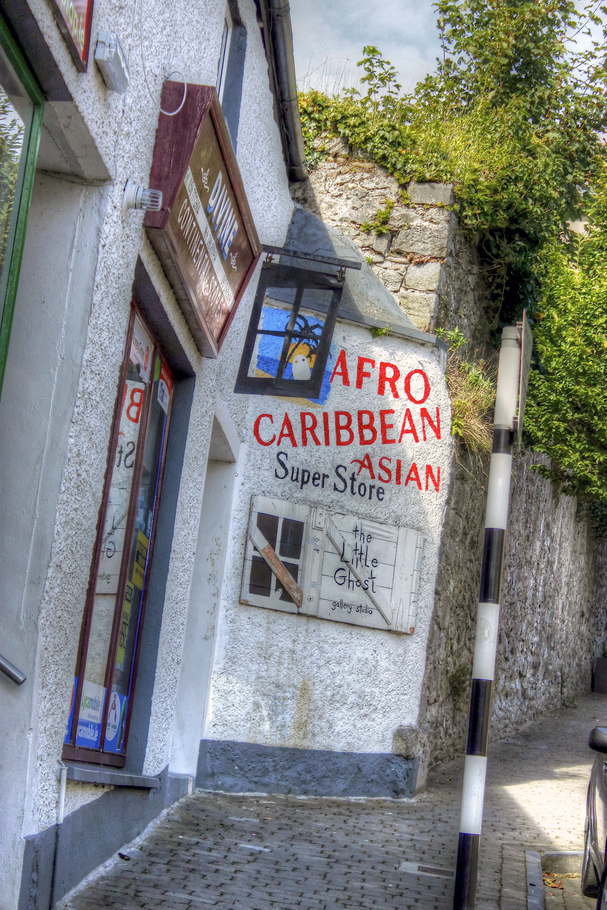 afro caribbean